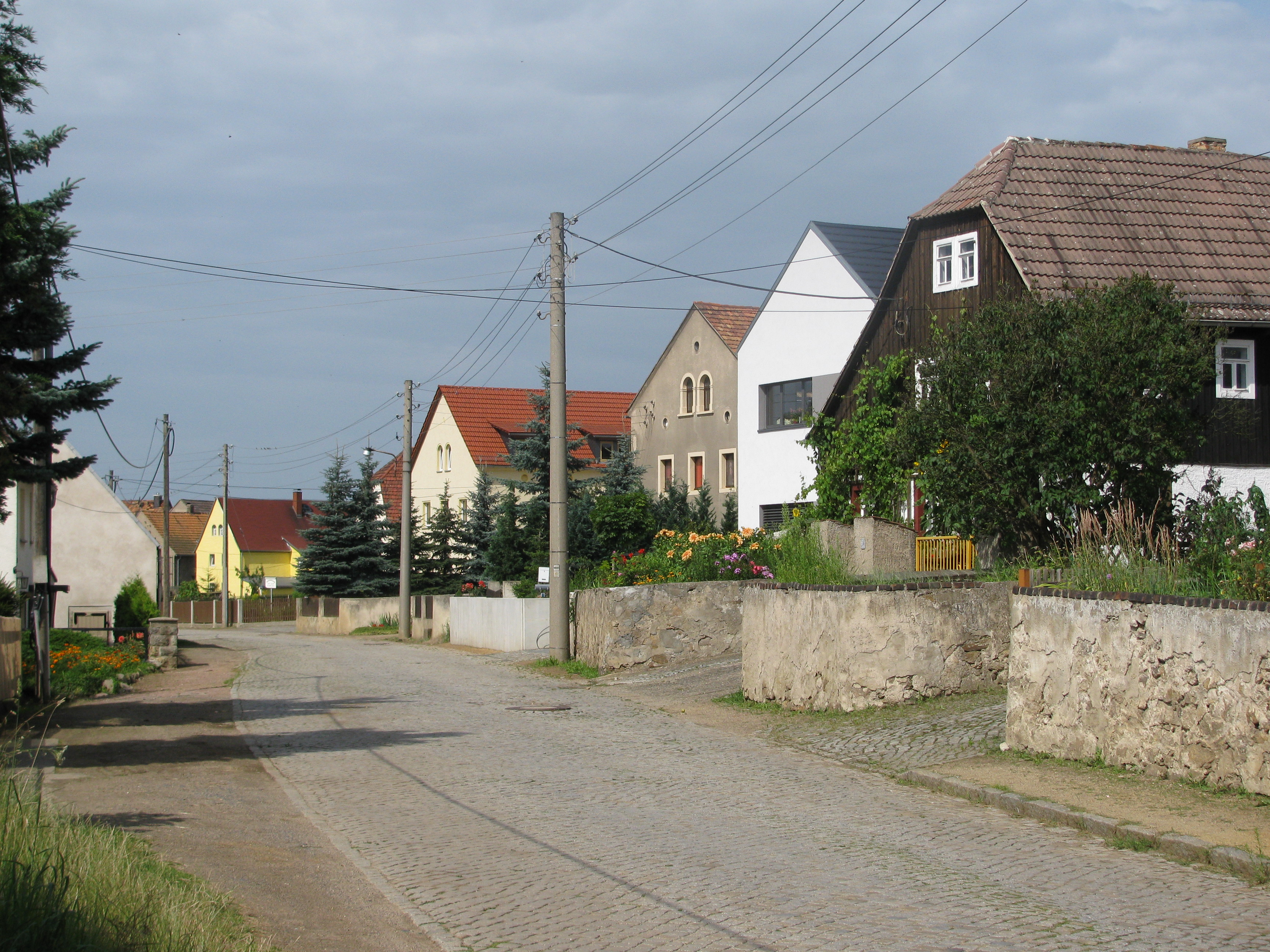 Häuser im Dorfkern des früheren Marktfleckens Eisenberg, Gemeinde Moritzburg, Sachsen